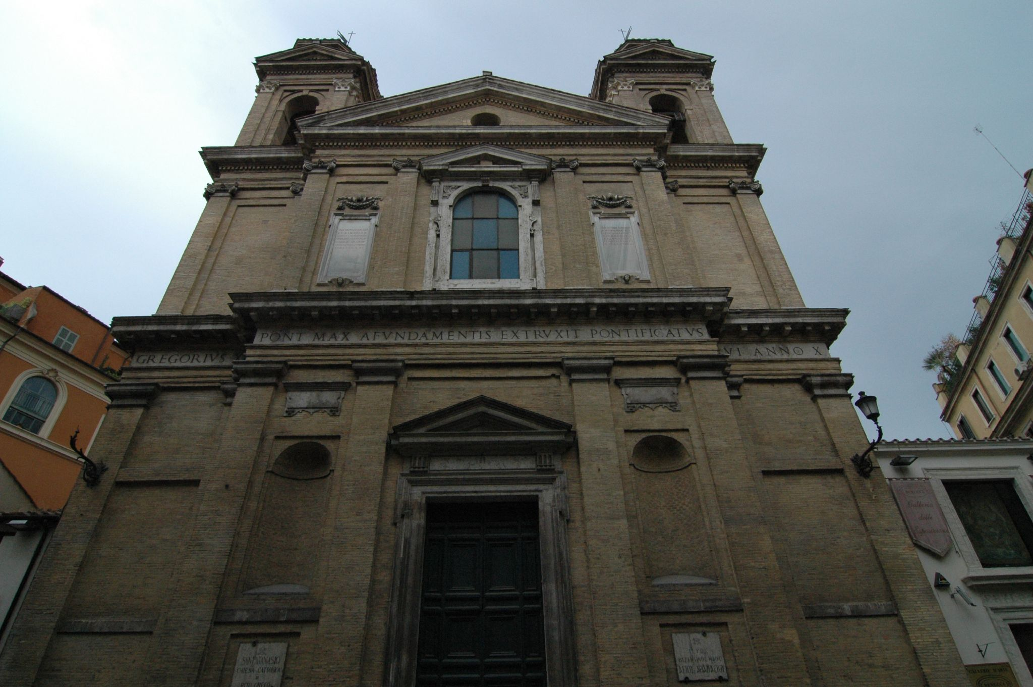 Chiesa di Sant'Atanasio, in via del Babuino, a Roma, nel rione Campo Marzio.